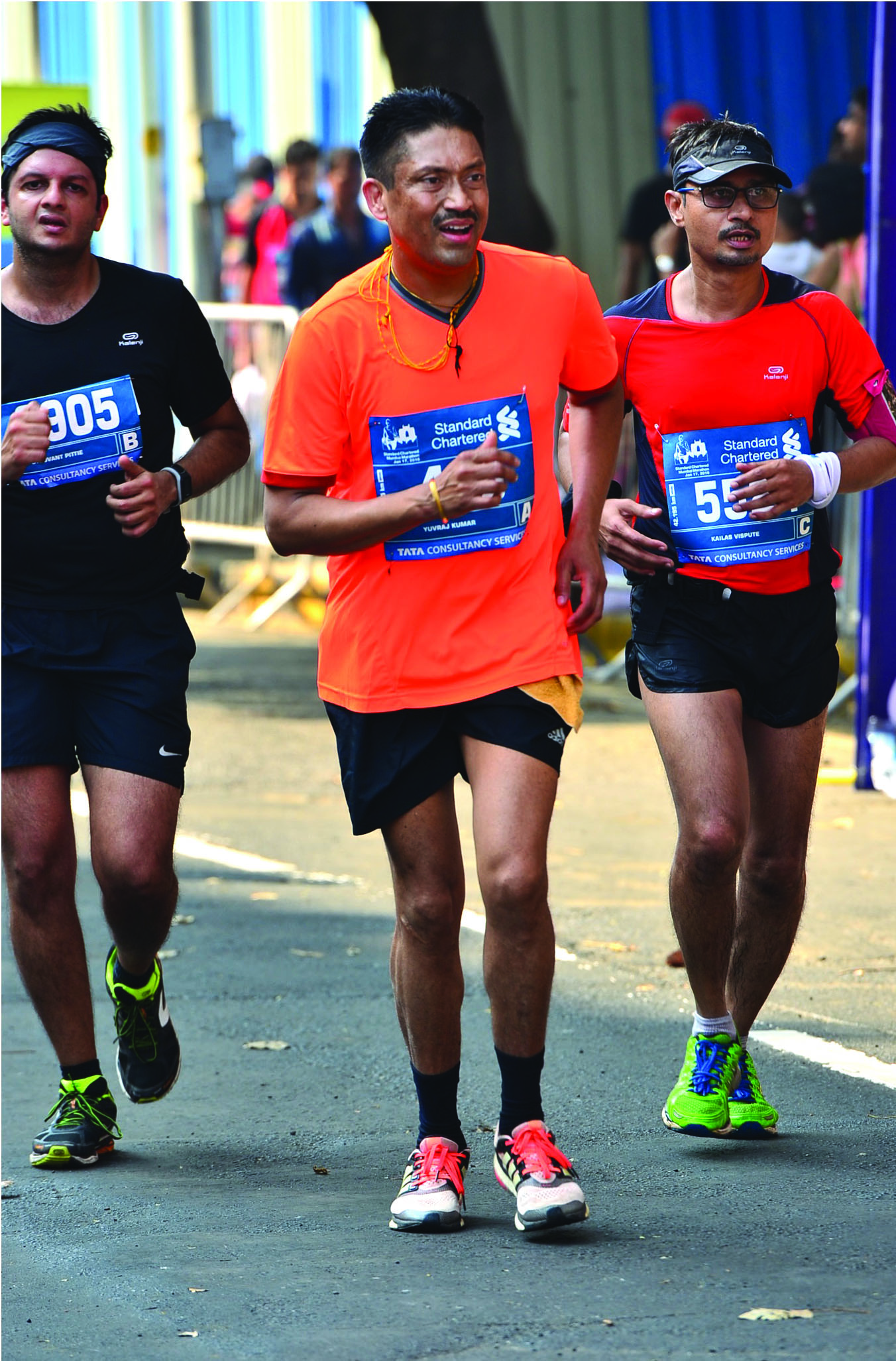 मुंबई फुल मैराथन में हिस्सा लेते हुए डा. युवराज कुमार (बीच में)